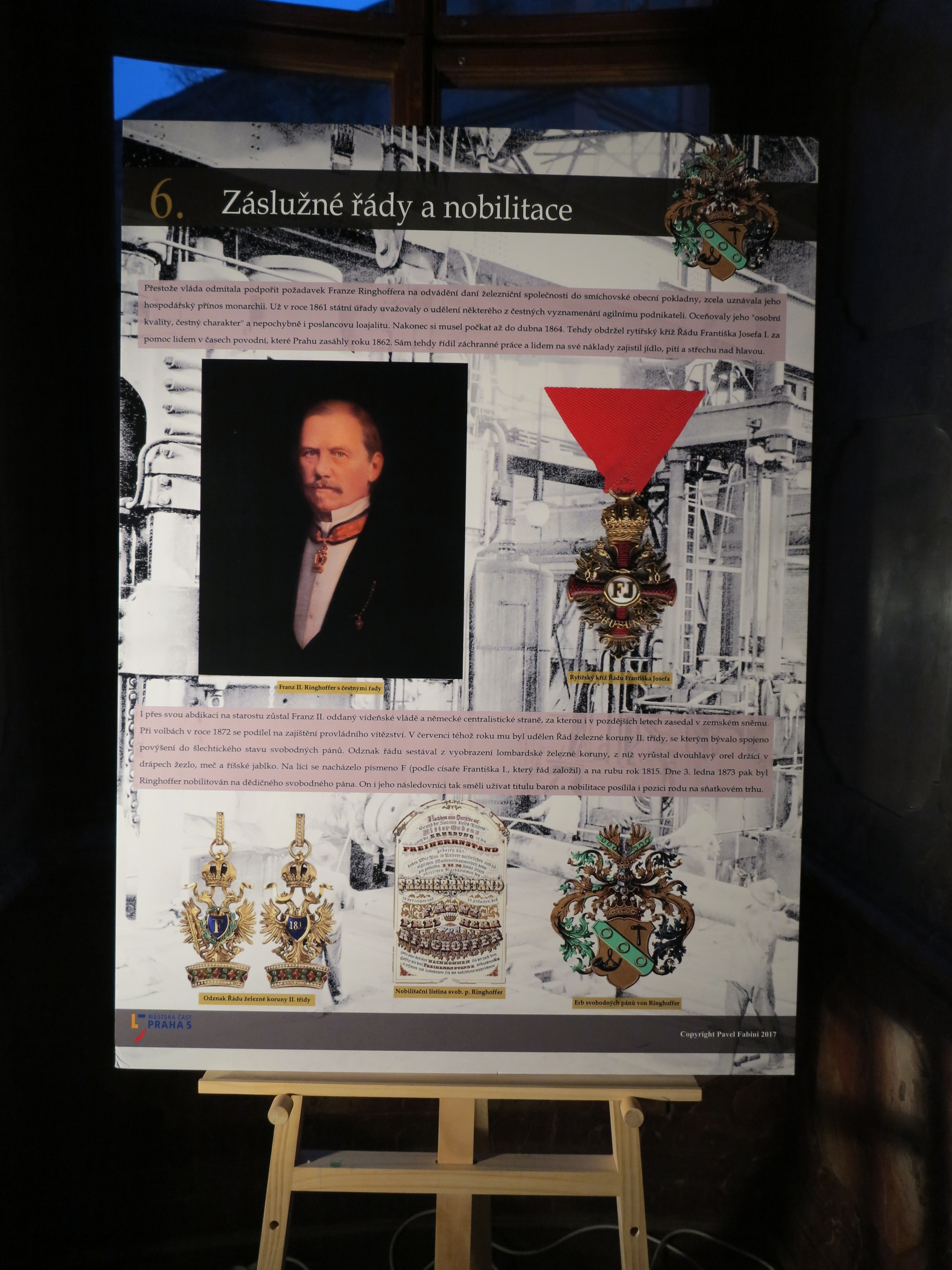 Jeden z panelů výstavy o Ringhofferech. Vpravo dole: Copyright Pavel Fabini 2017.